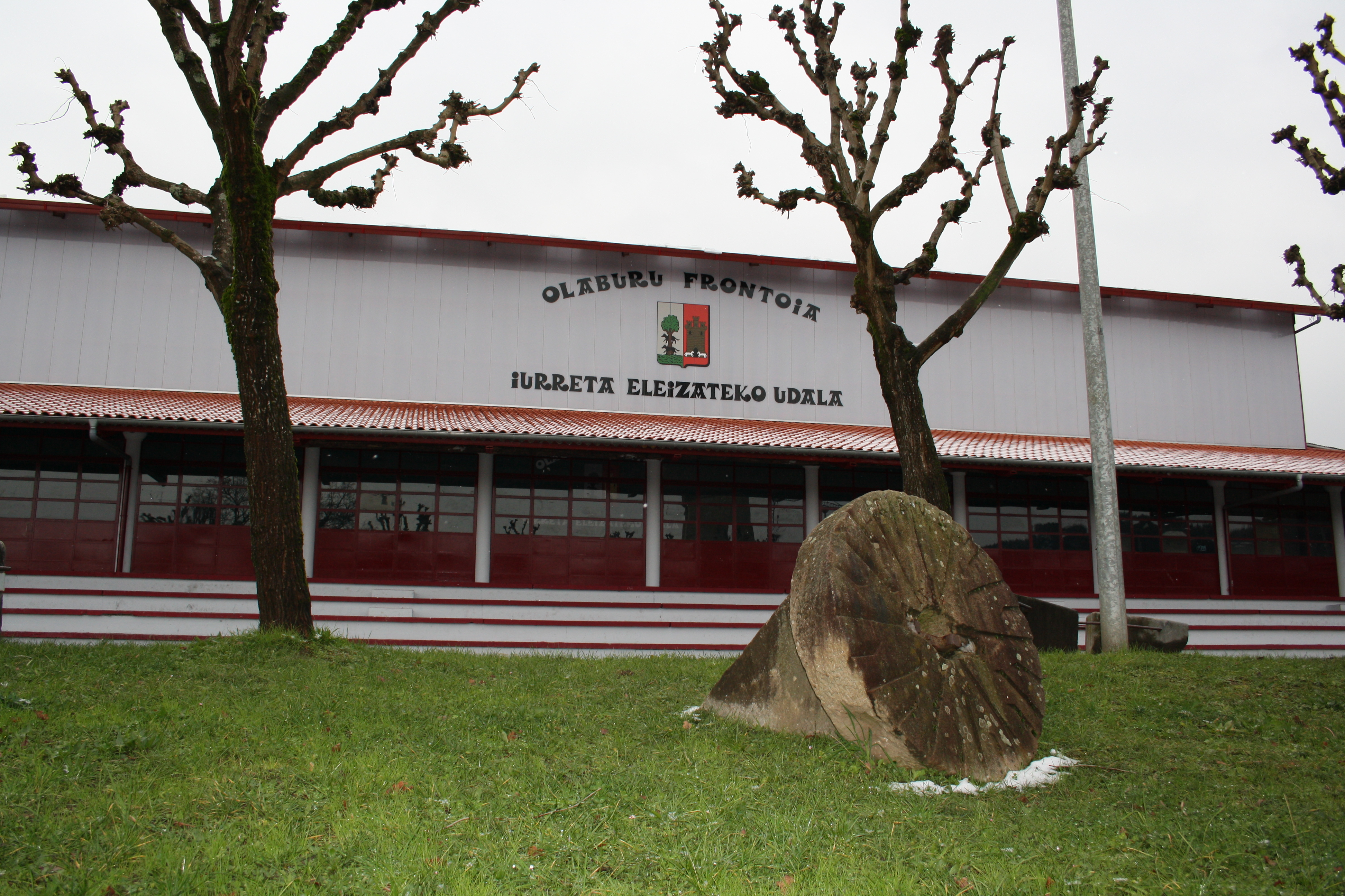 Frontoia